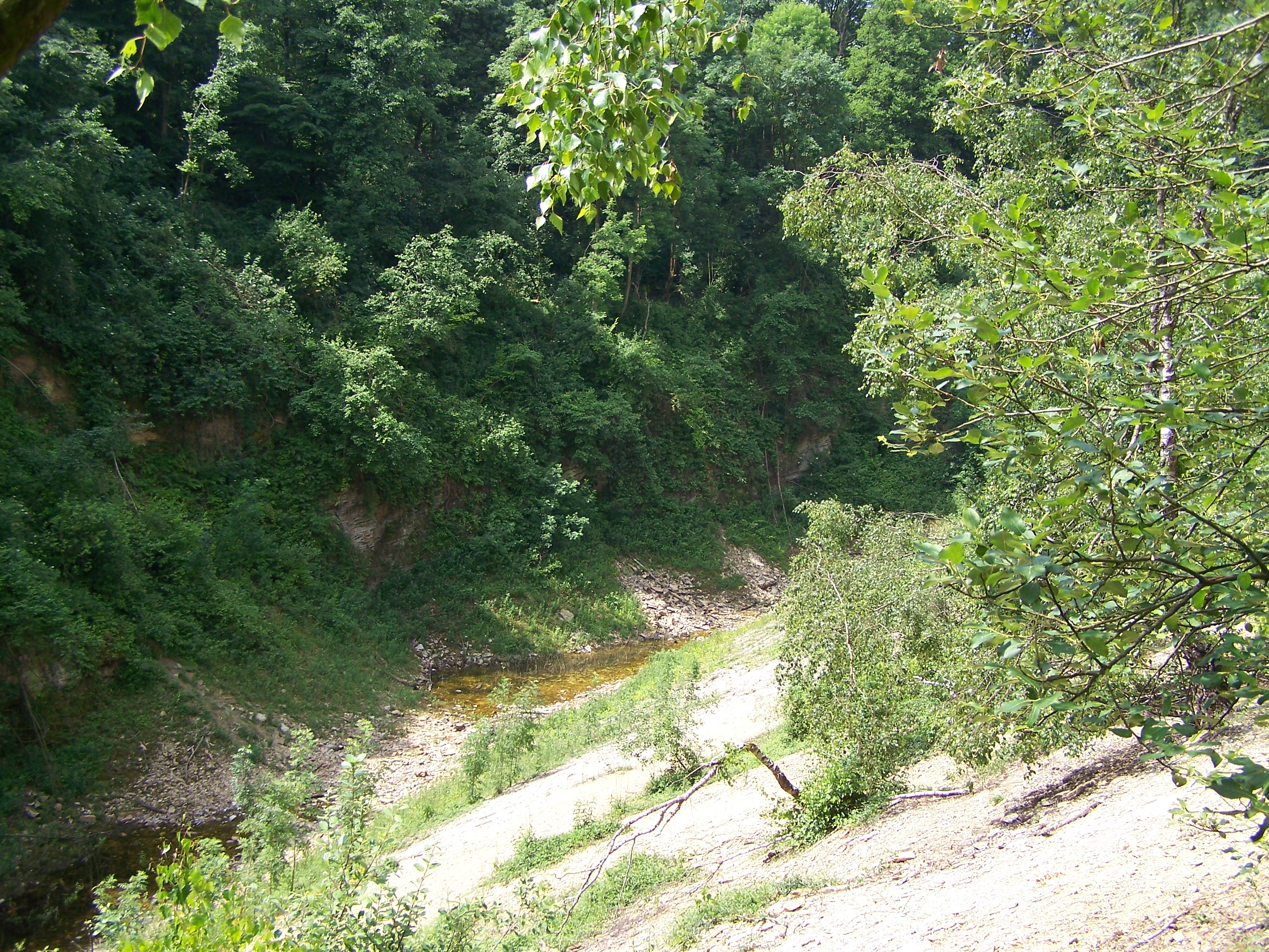 Ausgetrockneter Silbersee im Hüggel